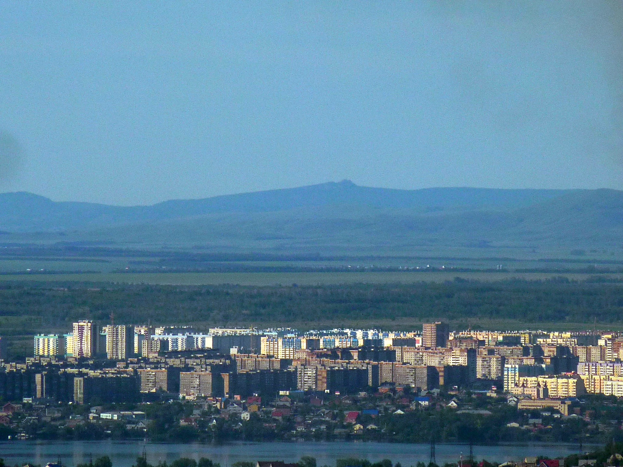 Вид на гору Куянташ хребта Ирендык